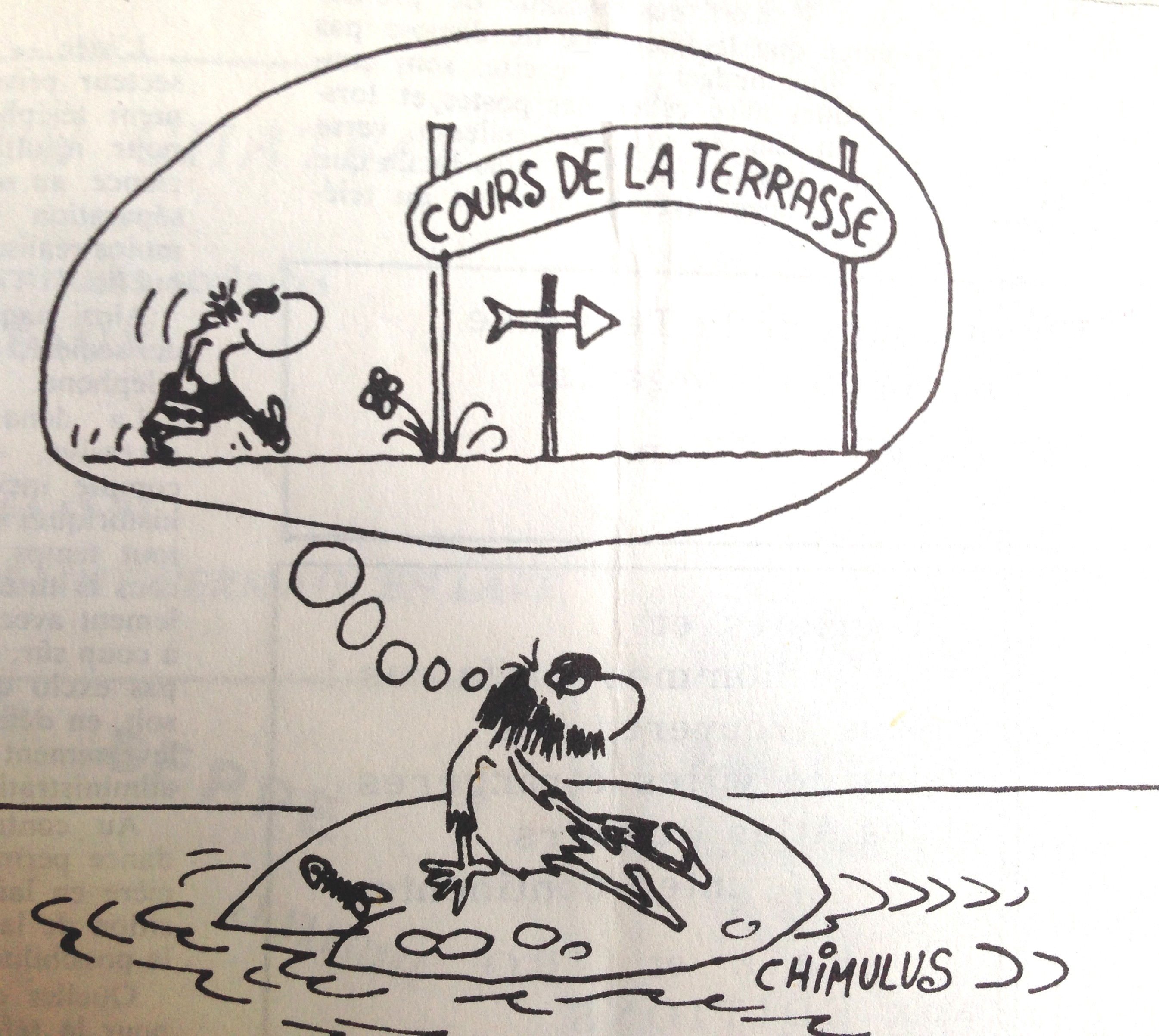 Chimulus a offert ce dessin lors du lancement du Bulletin de l'association des anciens dans les années 60